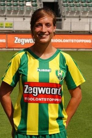 Leonne Stentler